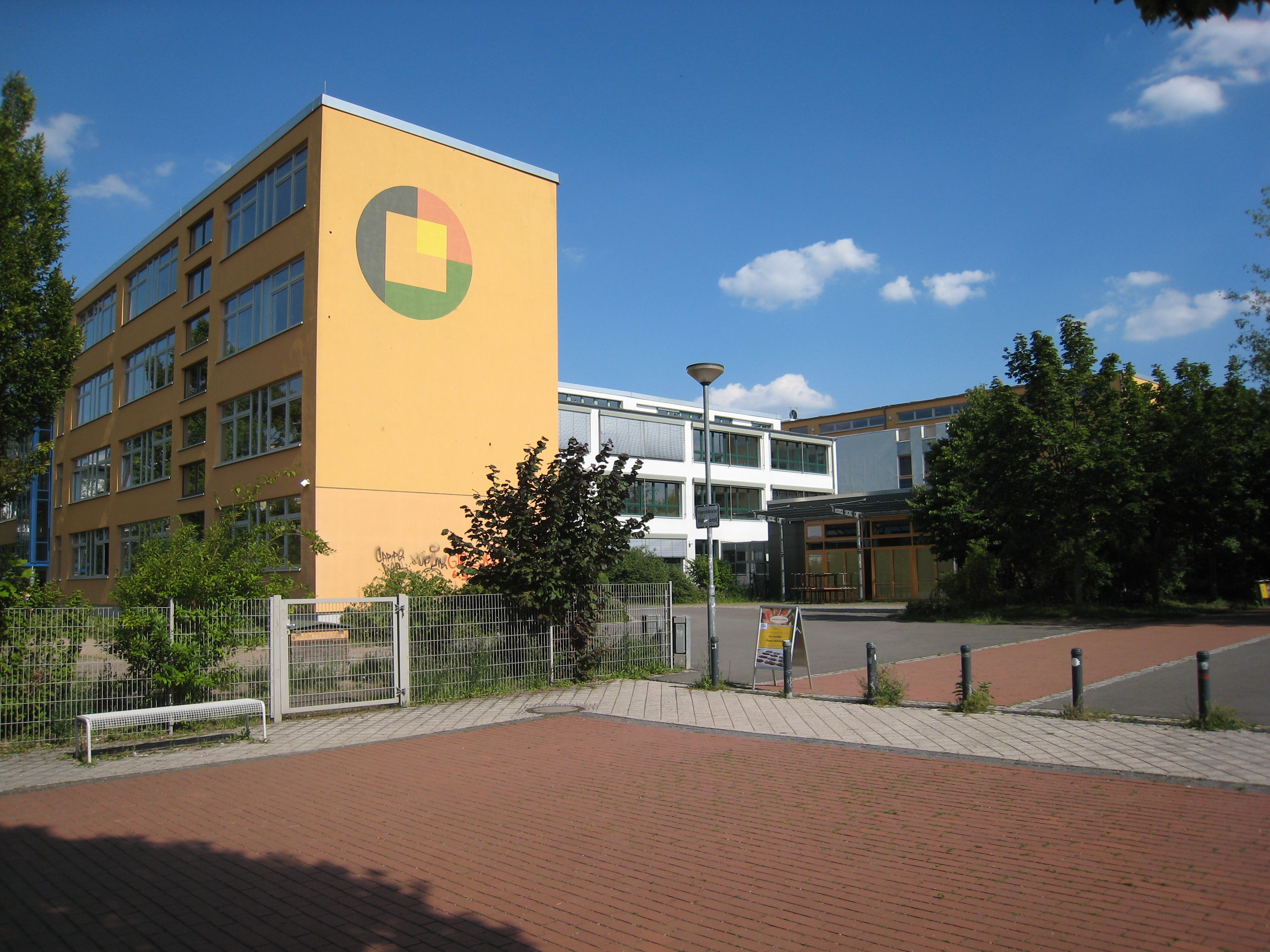 Das Albert-Schweitzer-Gymnasium in Erfurt (Vilniuser Straße 17-19).